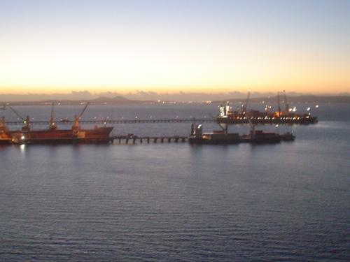 Mirador ubicado en la comuna de Penco, patrimonio turistico.